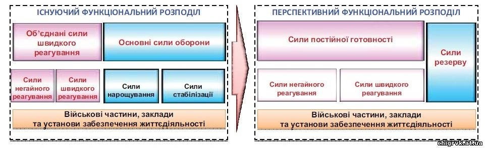 Функціональний поділ та реформа армії України за програмою до 2017 року